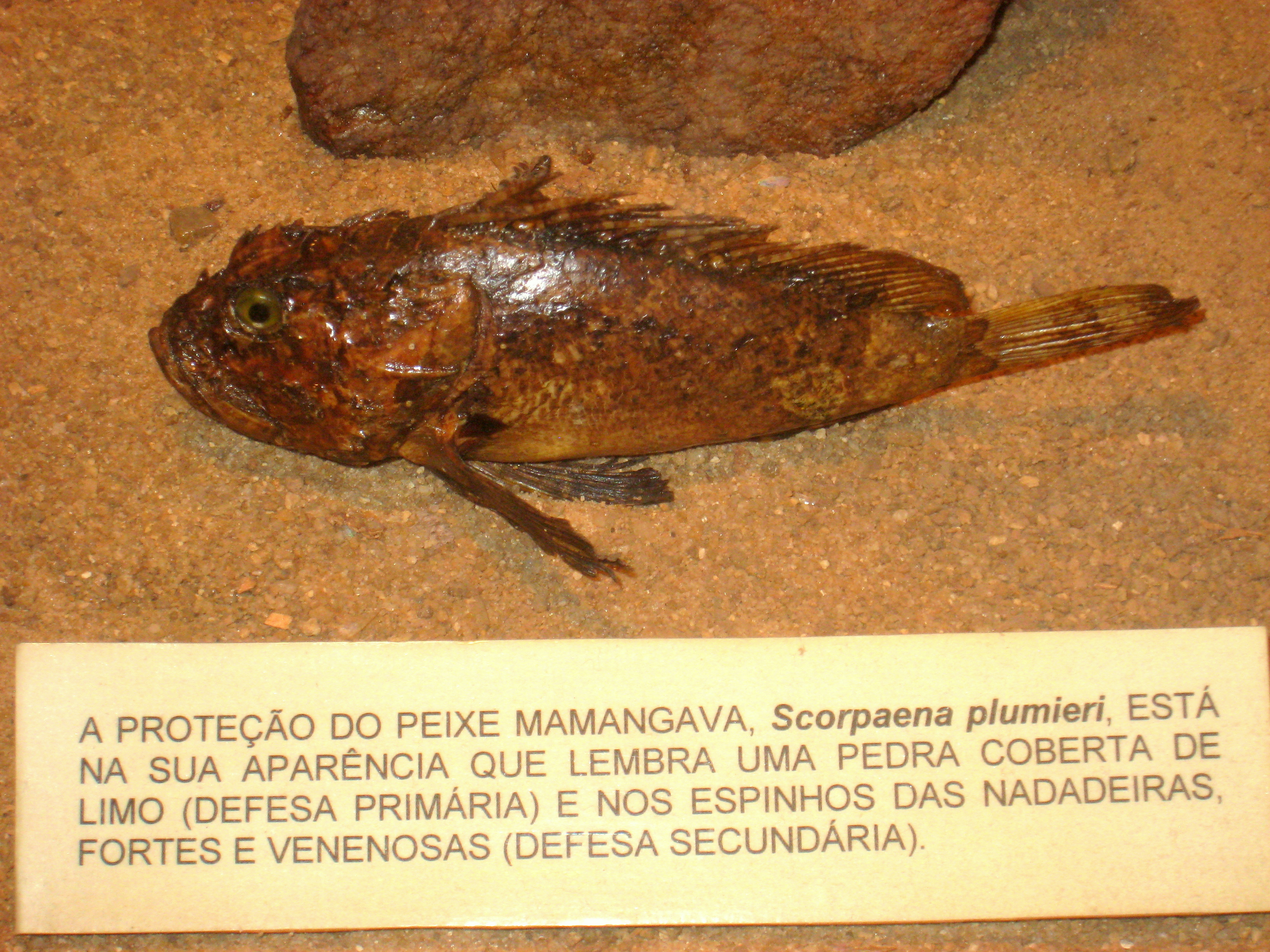 Museu de História Natural de Campinas, Campinas, SP, Brazil.